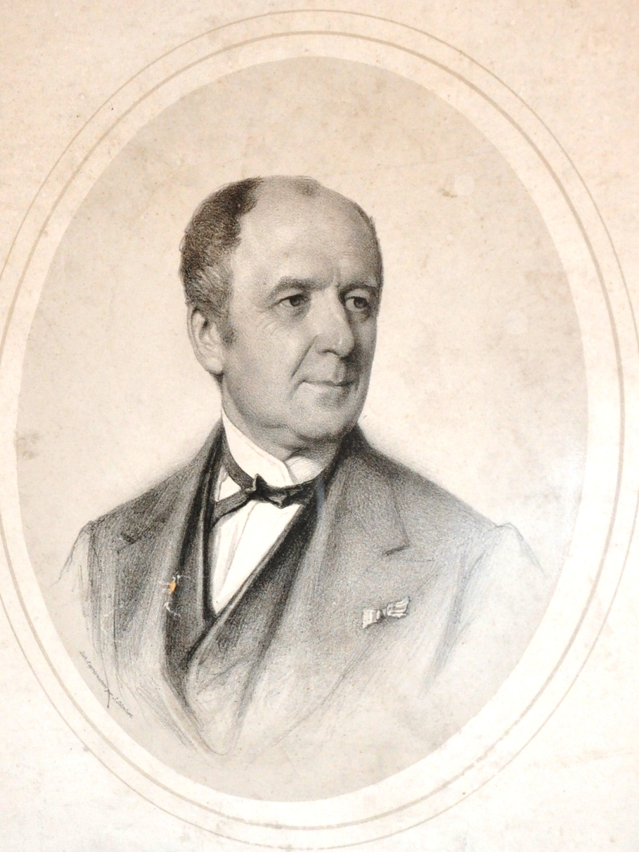 Lithographie d’Armand Wasseige avec la mention: Membre de la Chambre des Représentants, Ancien Ministre des Travaux Publics